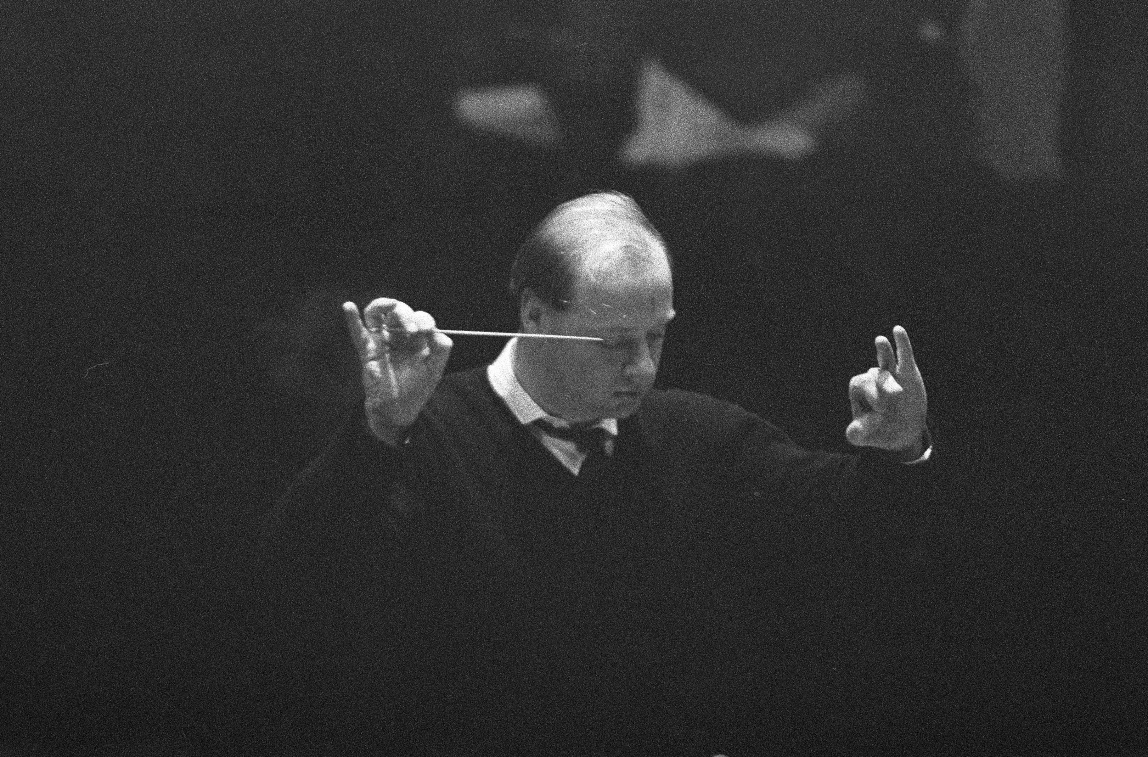 Bernard Haitink opvolger van Eduard van Bernum repeteert voor de eerste maal met het Concertgebouworkest, Bernard Haitink tijdens.